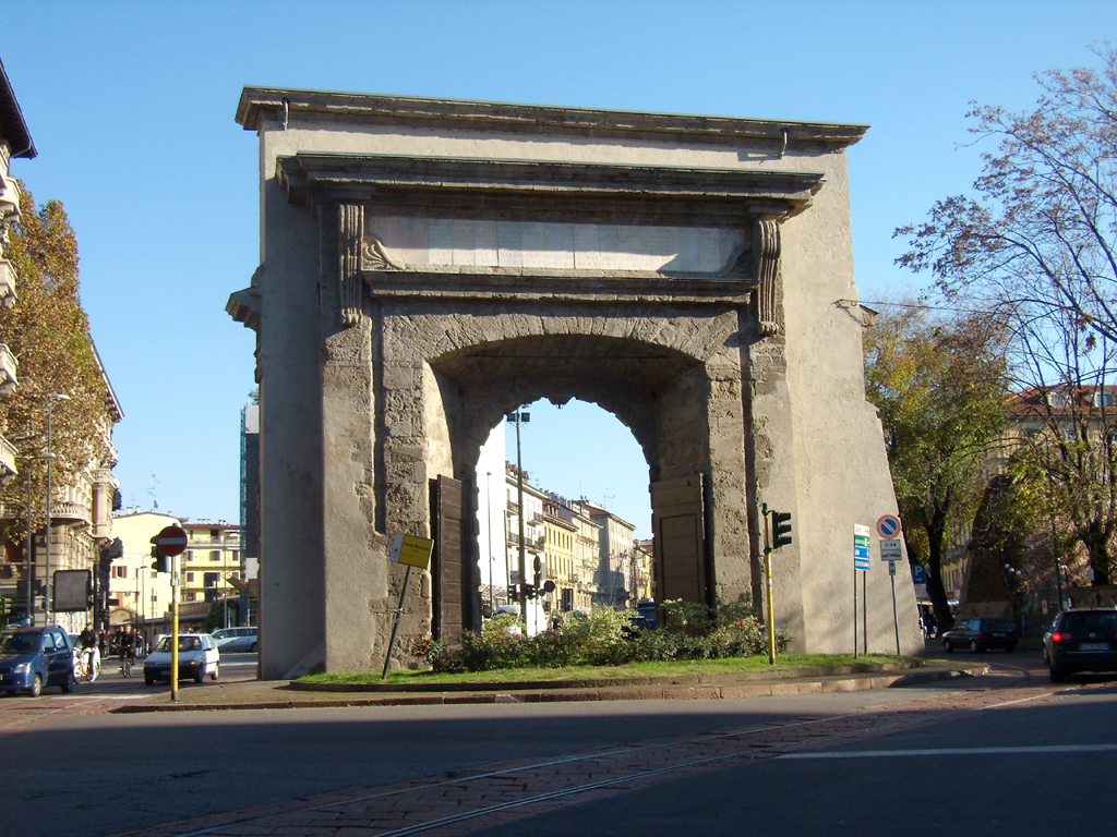 L'arco di Porta Romana in piazza Medaglie d'Oro a Milano, vista dal lato del centro città